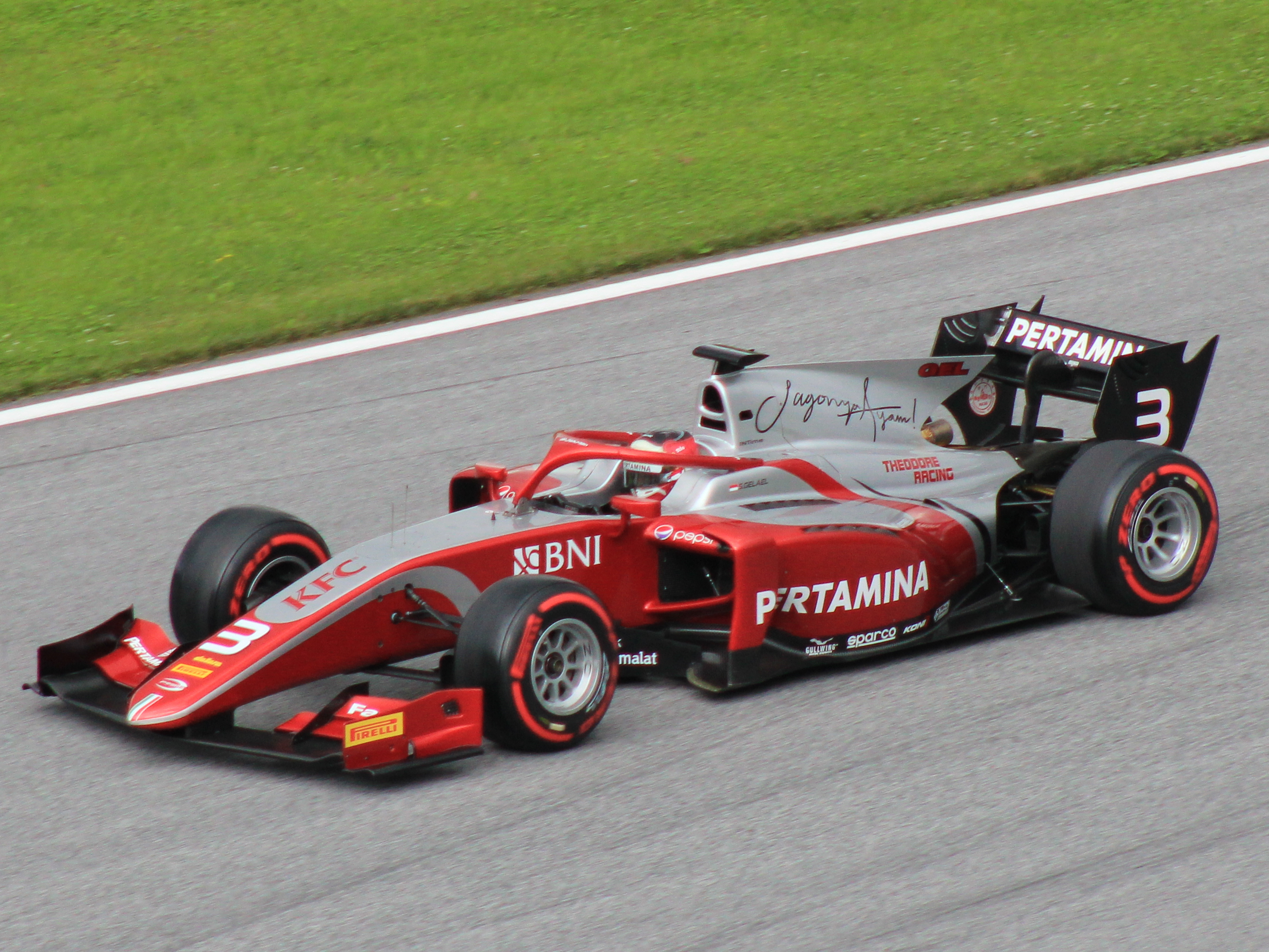 03 Sean Gelael beim Rennwochenende in Österreich 2018 (2)